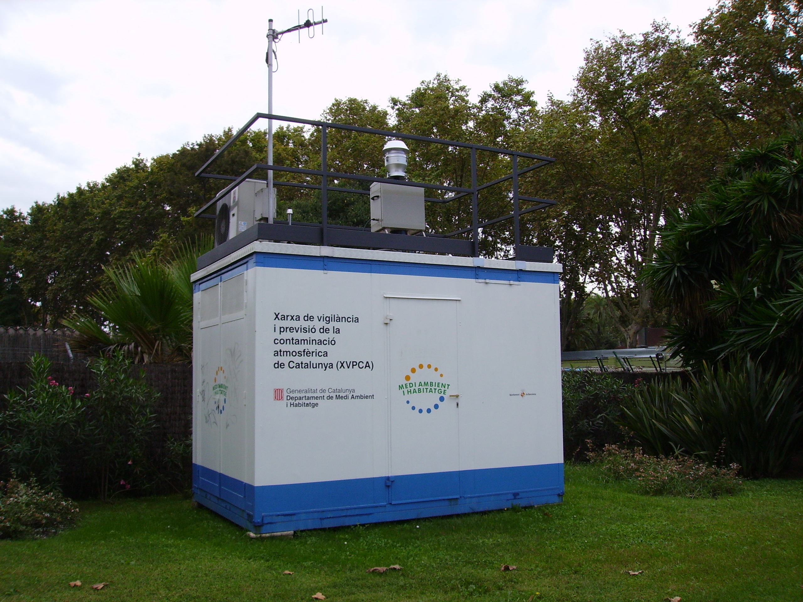 XVPCA (Generalitat de Catalunya)